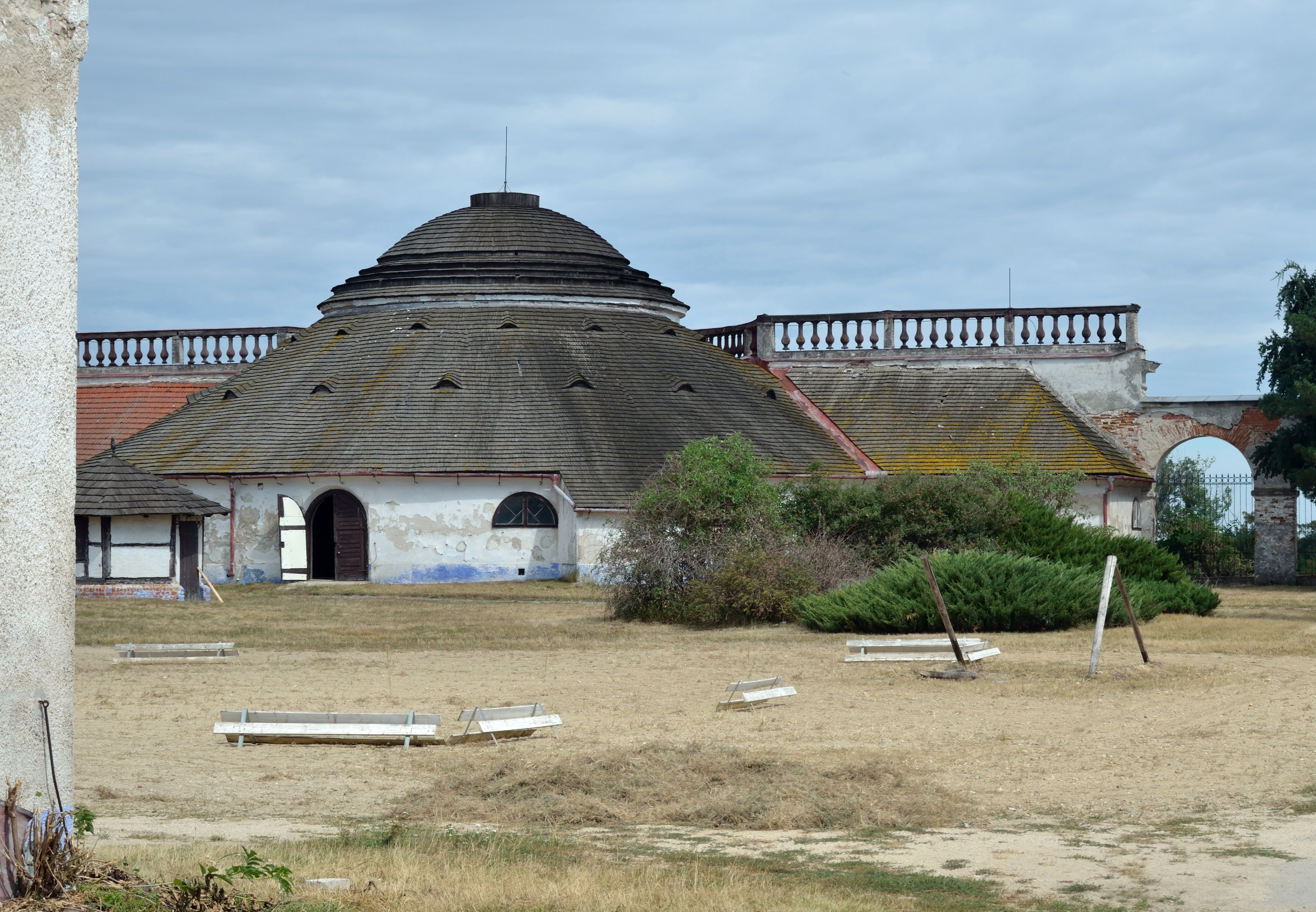 Zemědělský dvůr Nový dvůr (Charvátská Nová Ves), Charvátská Nová Ves